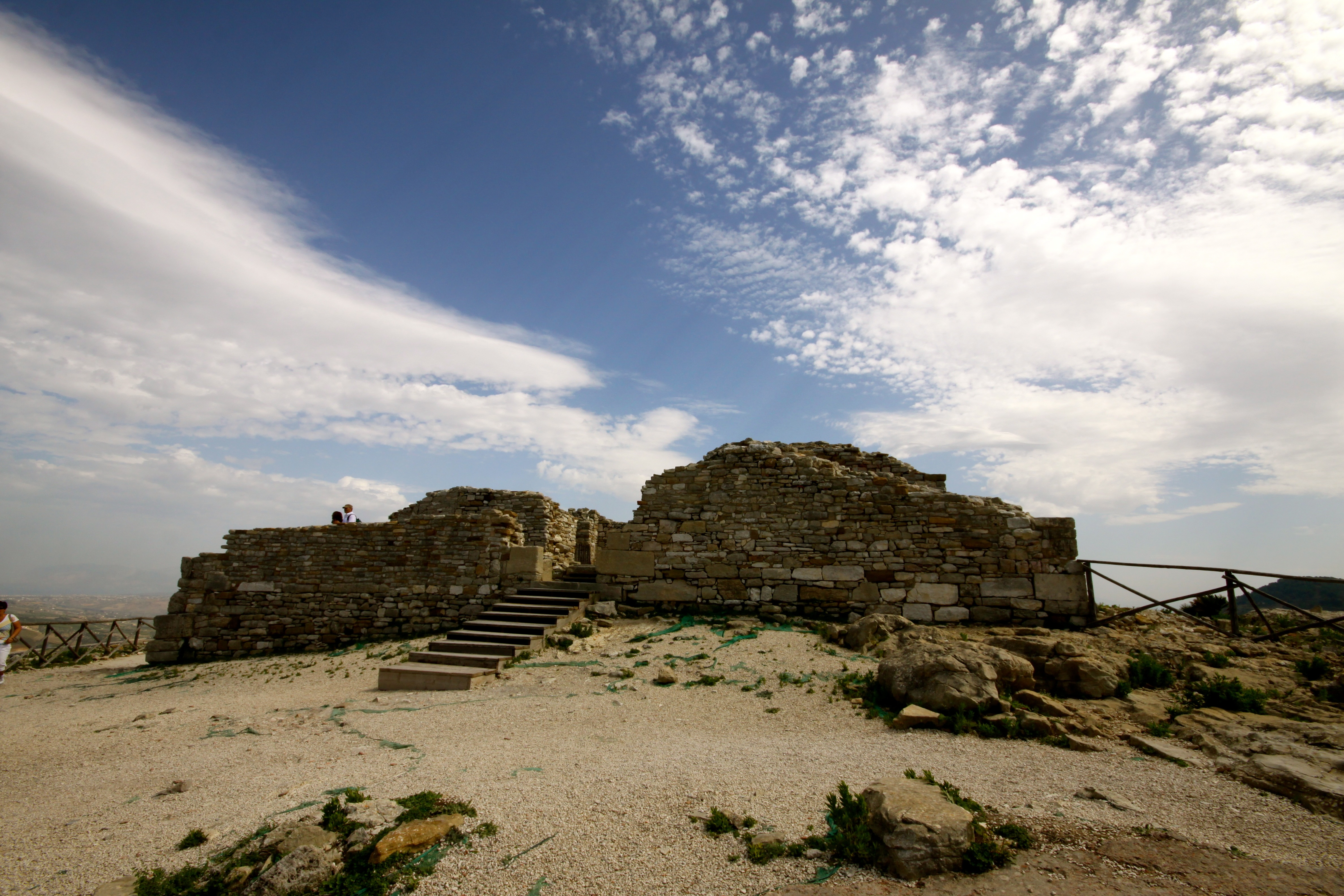 Segesta Ruine auf der Akropolis